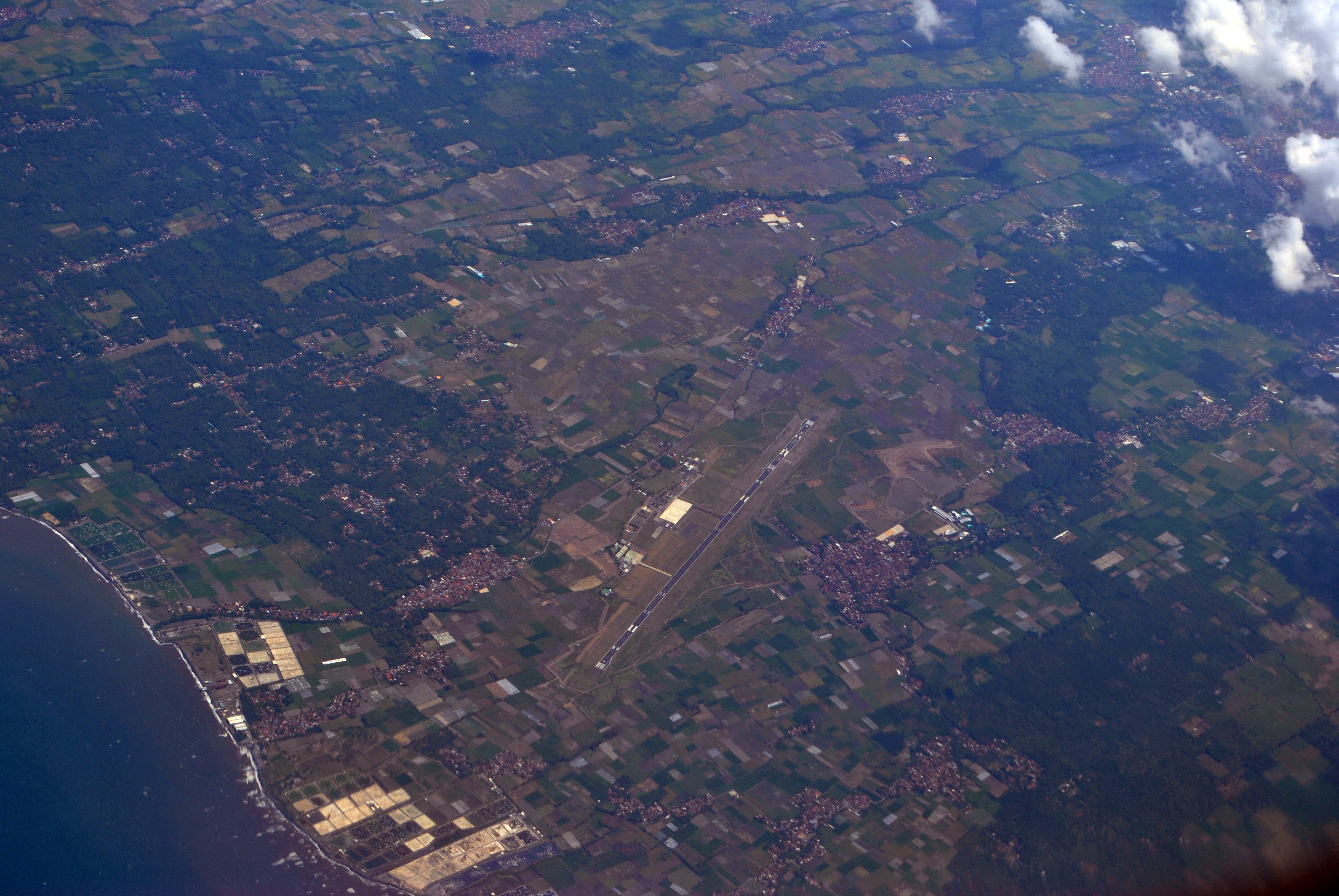 Belimbingsari Airport in Banyuwangi as viewed from Citilink's Airbus A320-200 mid-air. Bandara Belimbingsari, Banyuwangi dilihat dari pesawat Airbus A320-200 milik Citilink yang sedang mengudara.